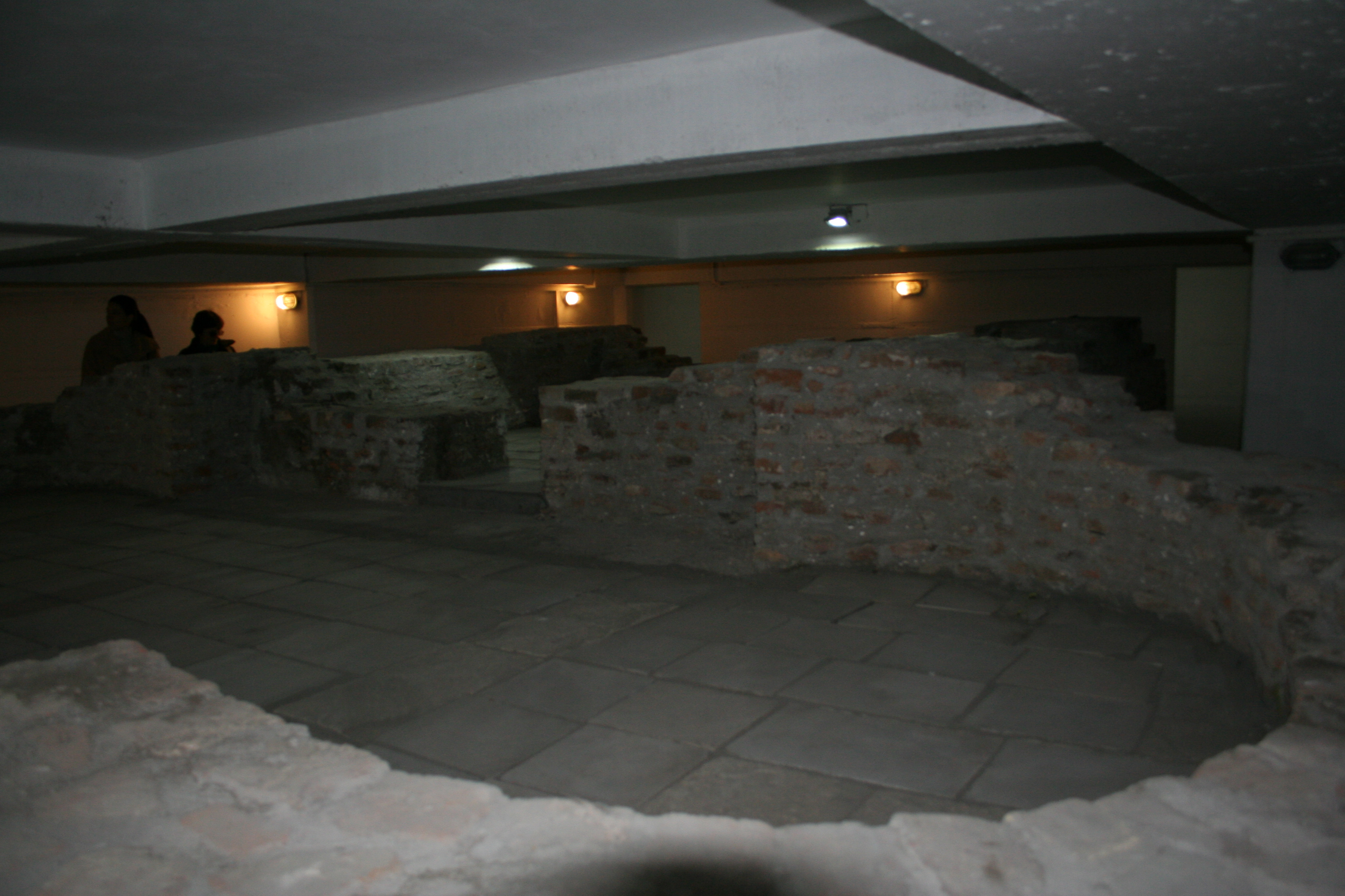 Manastir svetog Hristofora Mislođin